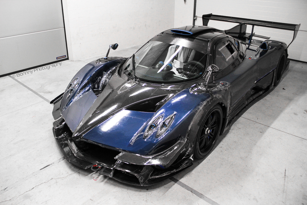 Pagani Zonda Revolution en el garage de la fabrica Pagani